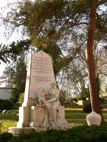 Grabmal des Unternehmers Ernst Albert Naether in Zeitz